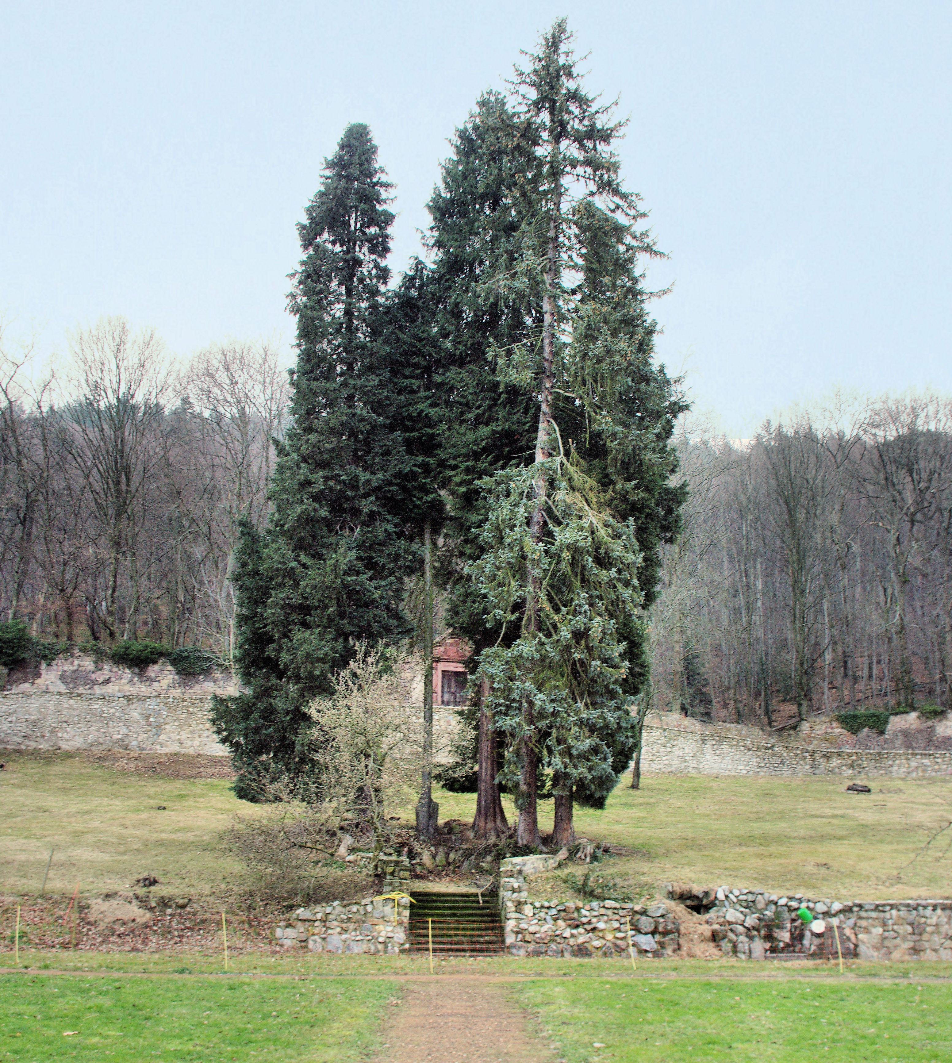 Bilder der Kartause Freiburg